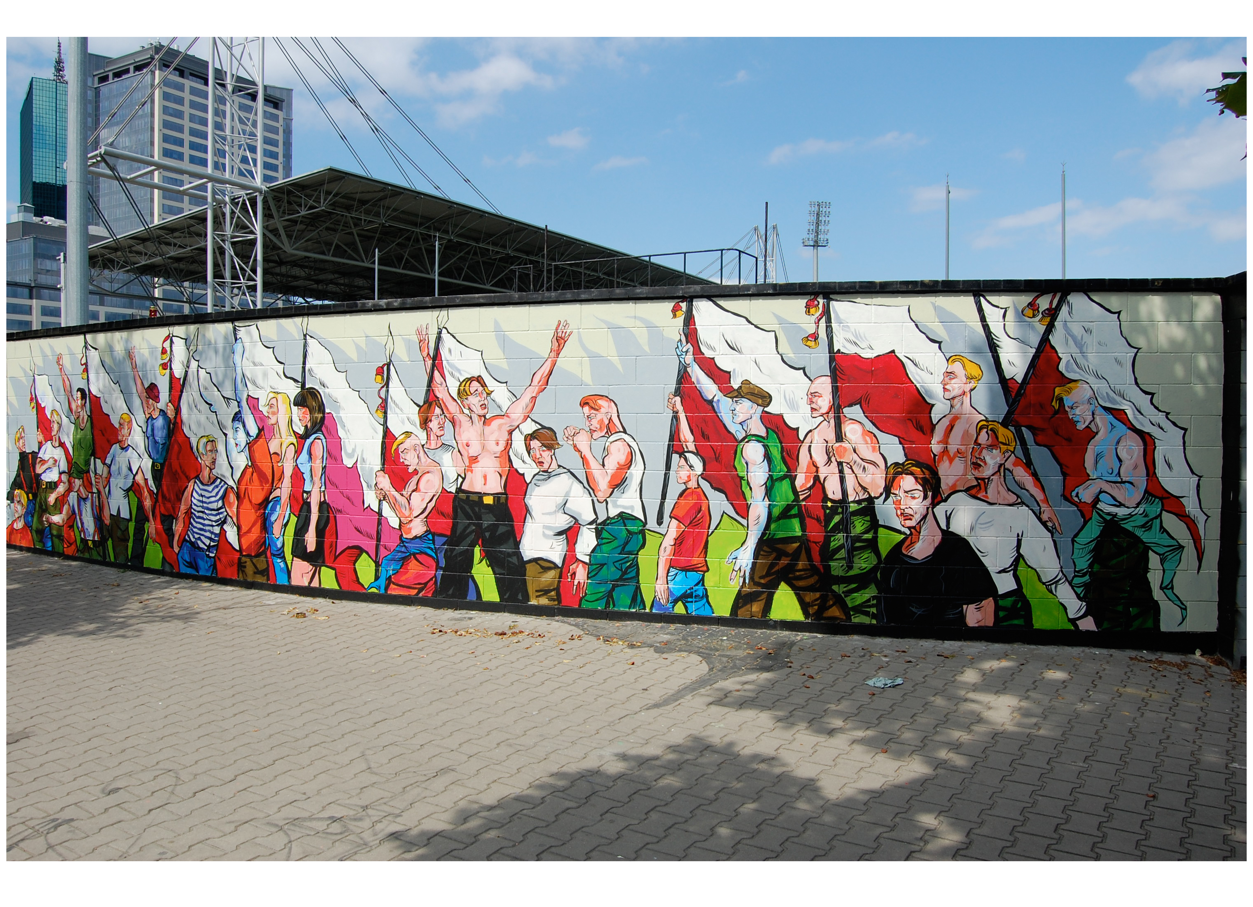 Rafał Roskowiński - materiały ze zbiorów autora.